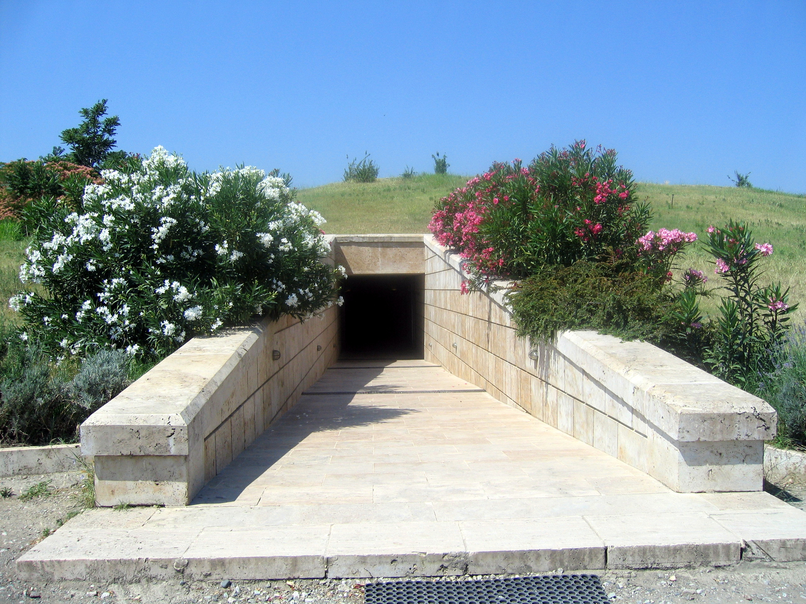 Vergina - Tombs' Entrance.